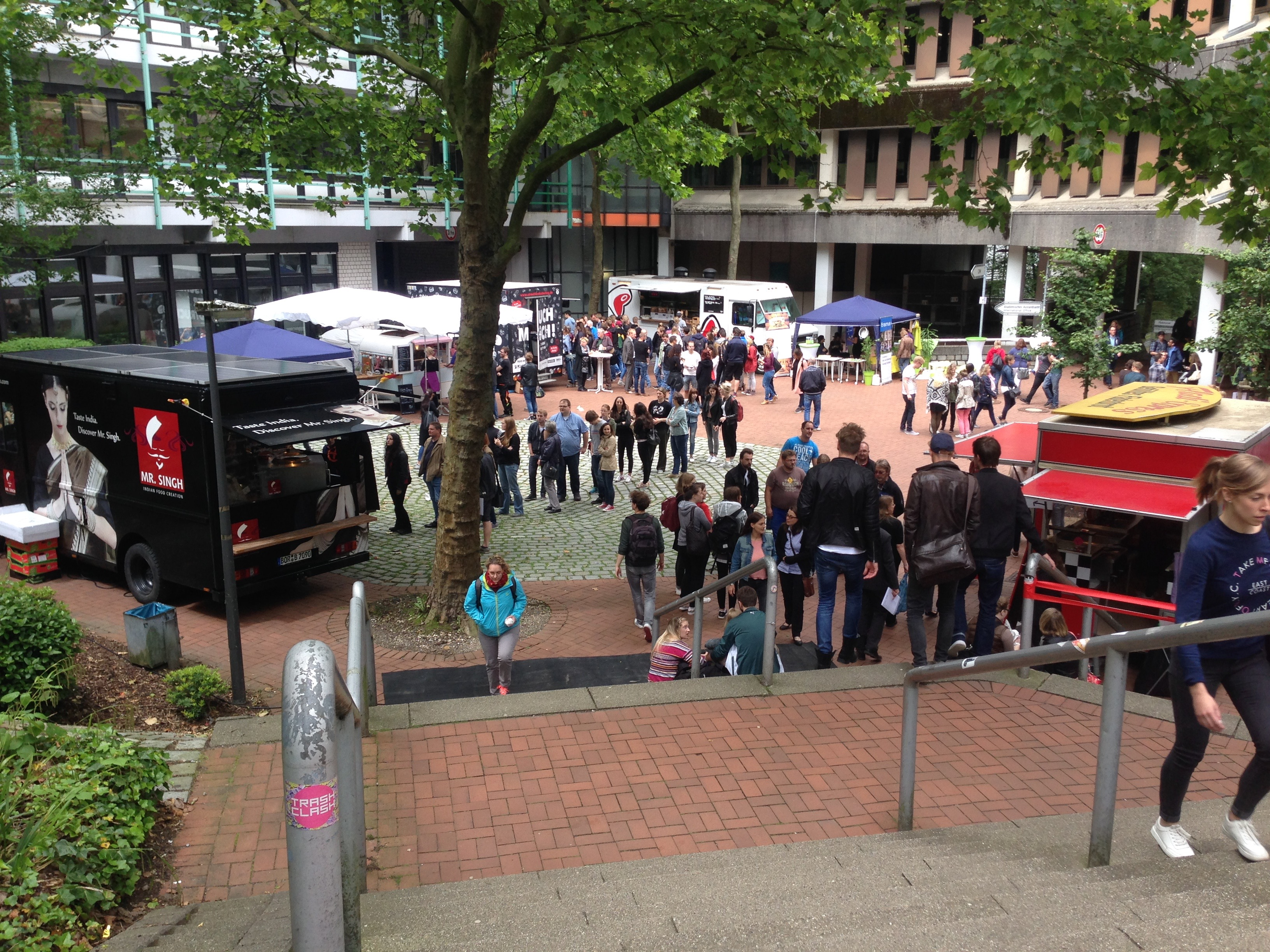 Veranstaltung "1. Streetfood Wuppertal @Campus" im Juni 2016